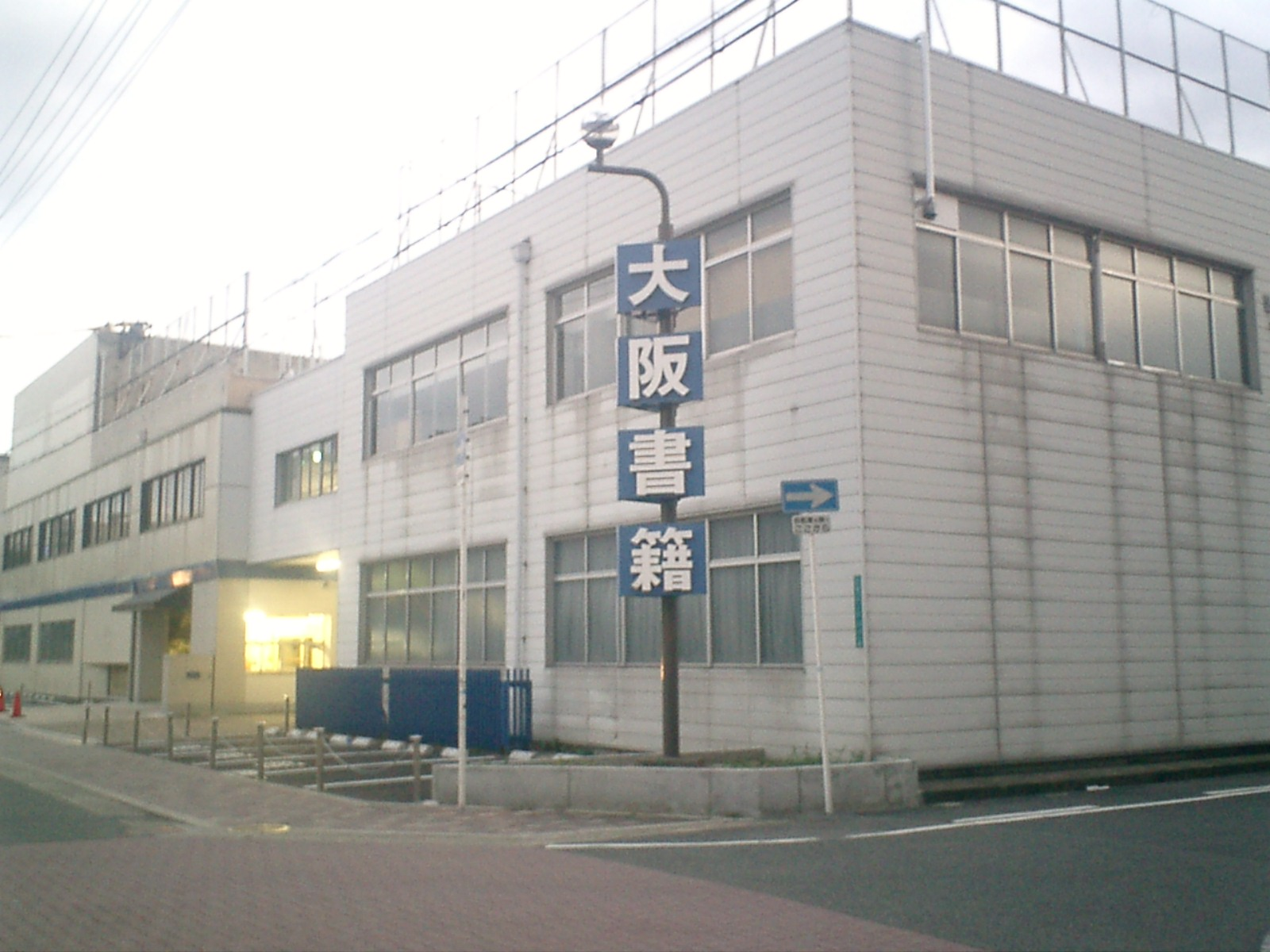 Osaka-Shoseki at Higashinari Osaka-City